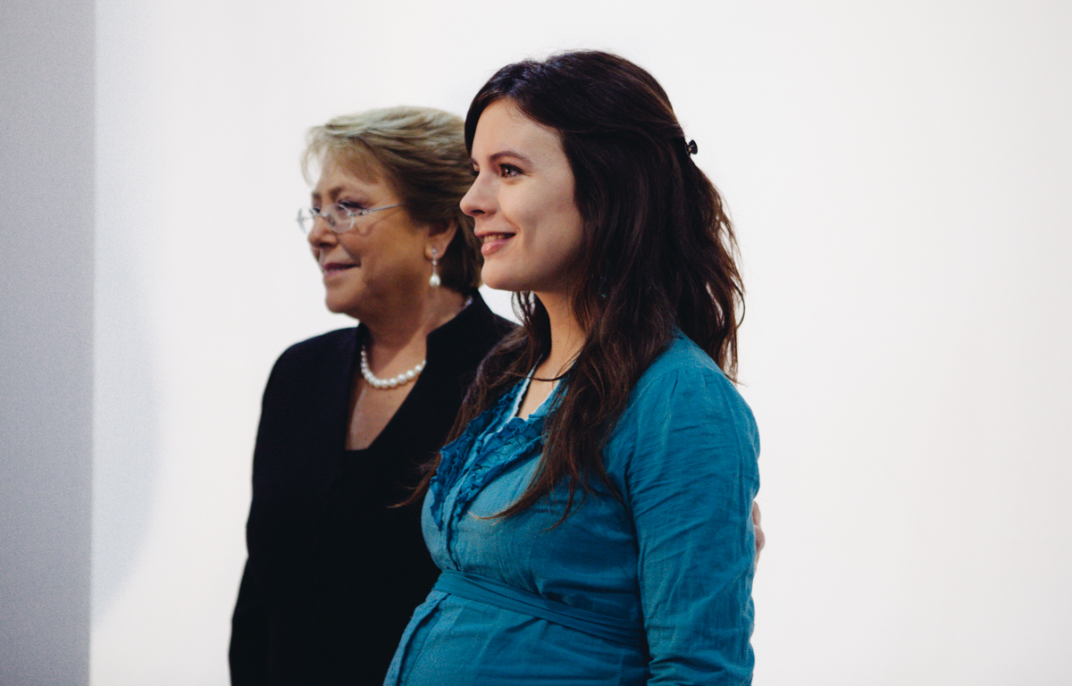 Michelle Bachelet y Camila Vallejo en sesión de fotos de candidatos de la Nueva Mayoría.